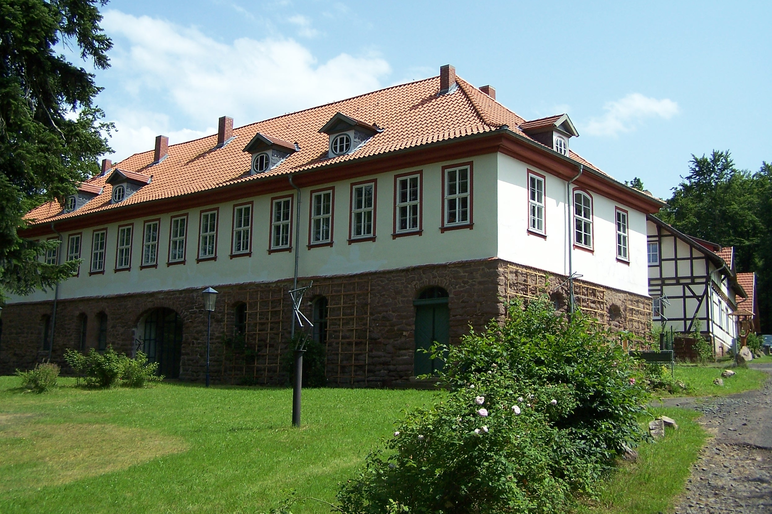 Der als Waldhaus bekannte Gebäudekomplex südlich des Schlosses wird heute von einem Kunstverein genutzt.